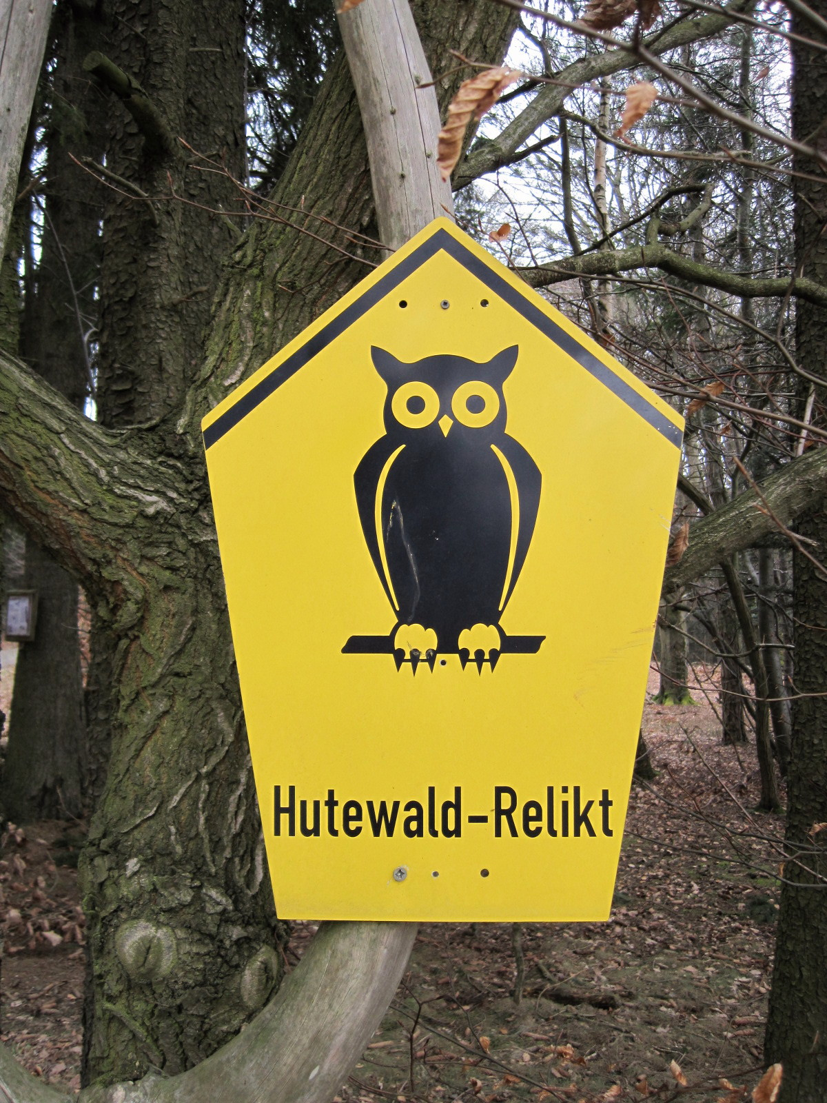 Hutewald oder Hudewald bei Zorn, einem Ortsteil von Heidenrod. Diente früher der Beweidung mit Schweinen zur Bucheckernmast. Alter ca. 270 Jahre. Rheingau-Taunus-Kreis, Hessen.